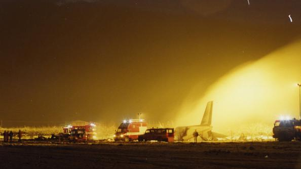 Incidente aereo a Villafranca di Verona del volo Banat Air 166